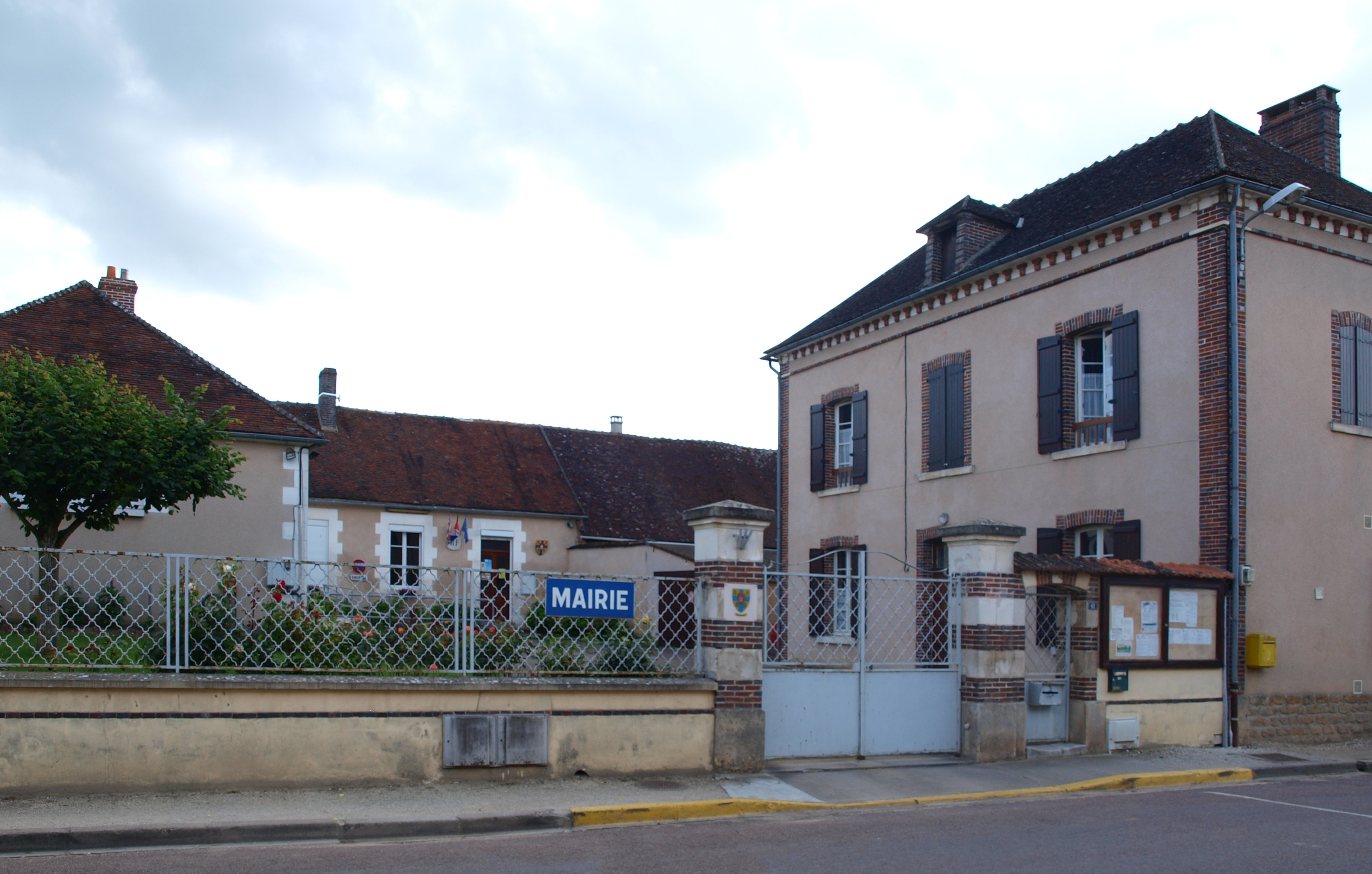 Champlay (Yonne, France) ; mairie